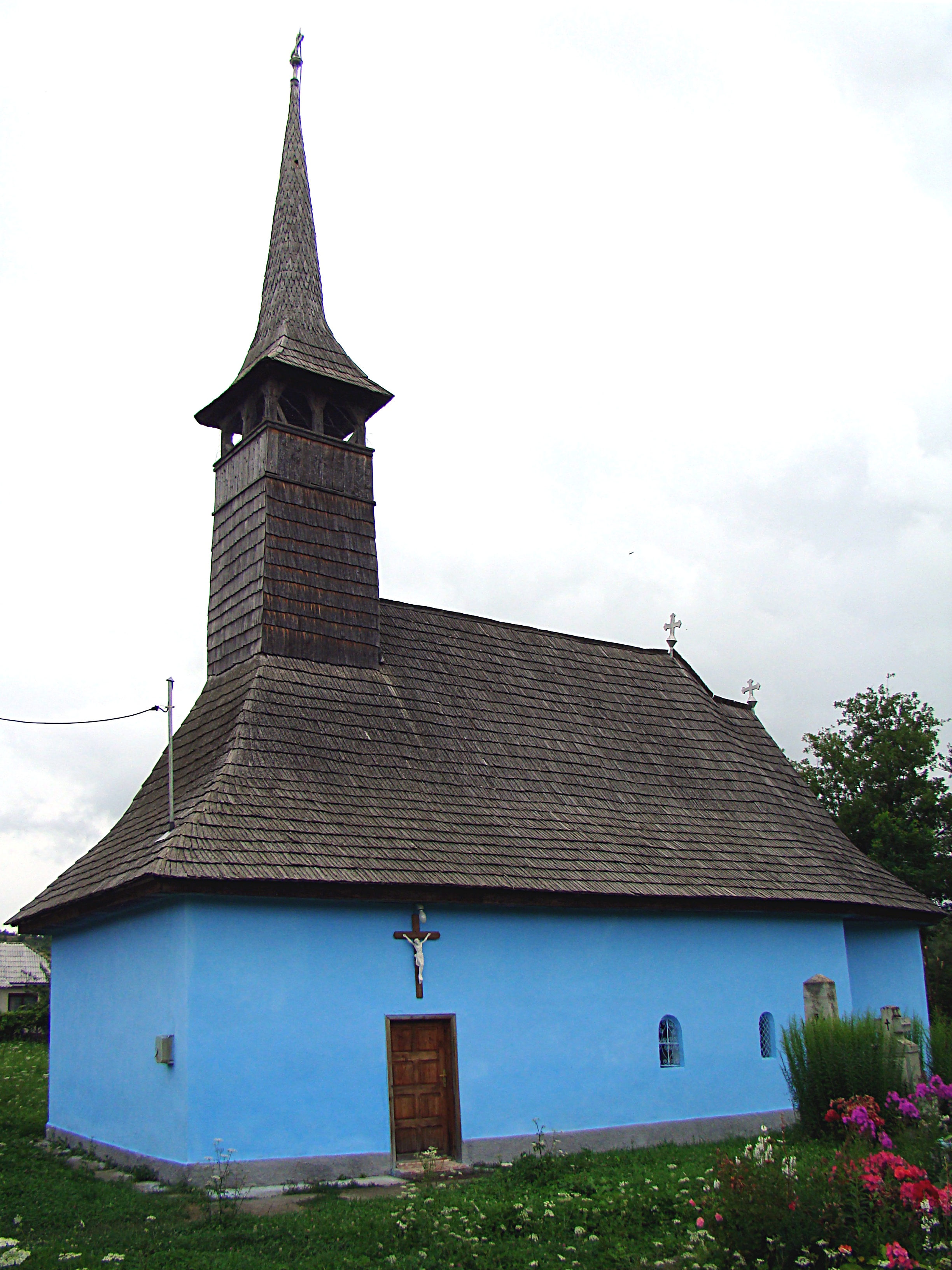 Biserica greco-catolică ”Nașterea Fecioarei Maria” Spermezeu